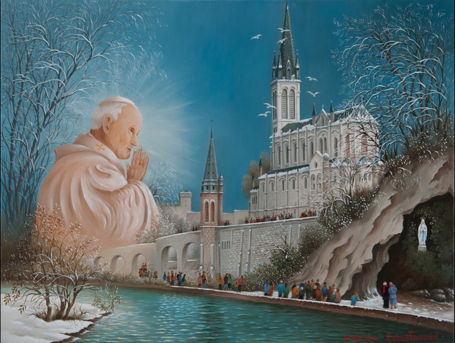 1er mai 2011 - Béatification du Pape Jean-Paul II (Lourdes la Grotte de Massabielle), œuvre peinte sur bois, 27x35, par le peintre français Raphaël Toussaint.